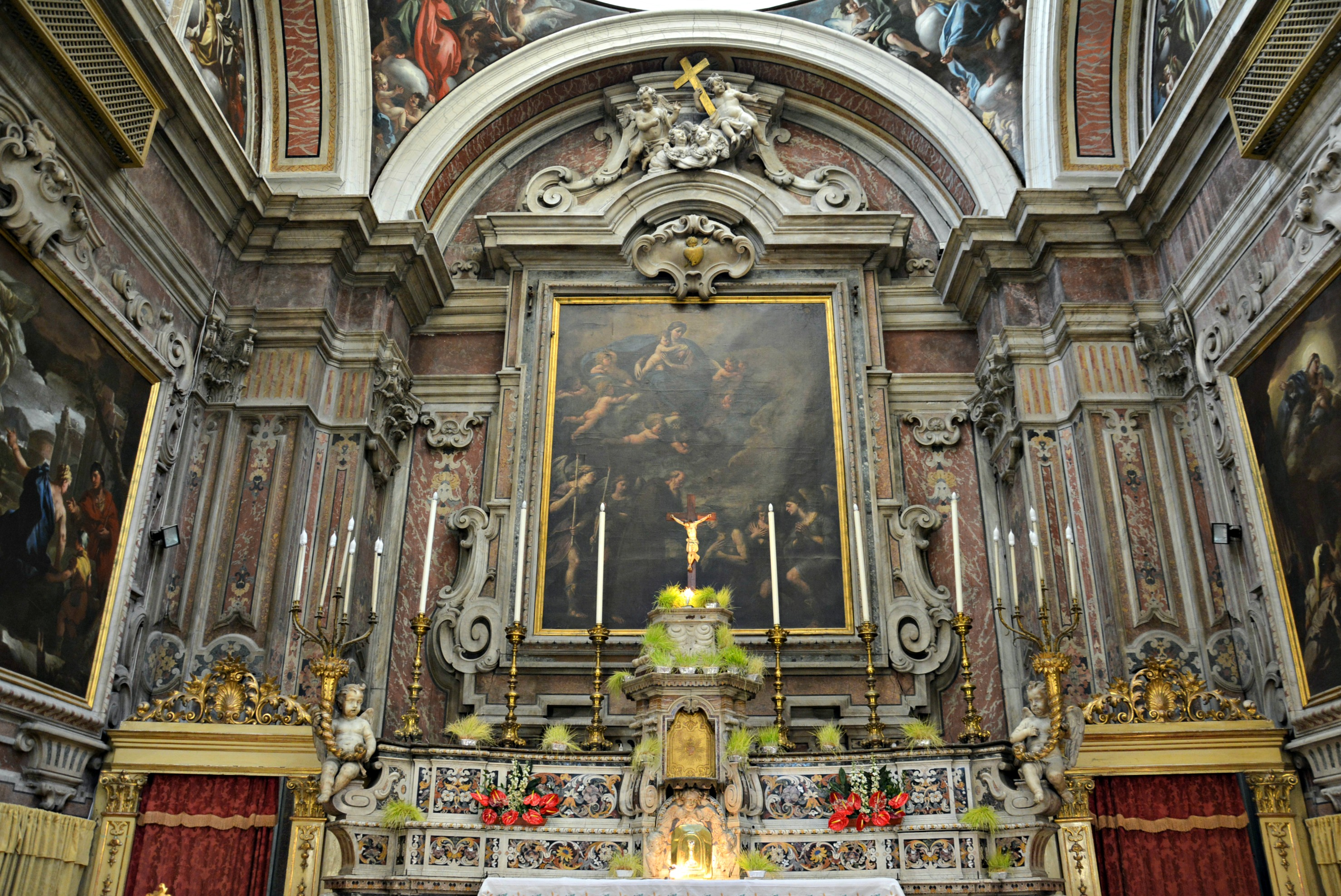 Chiesa di Santa Maria Egiziaca a Forcella a Napoli